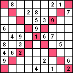 Beispiel für X-Sudoku mittlerer Schwierigkeitsstufe